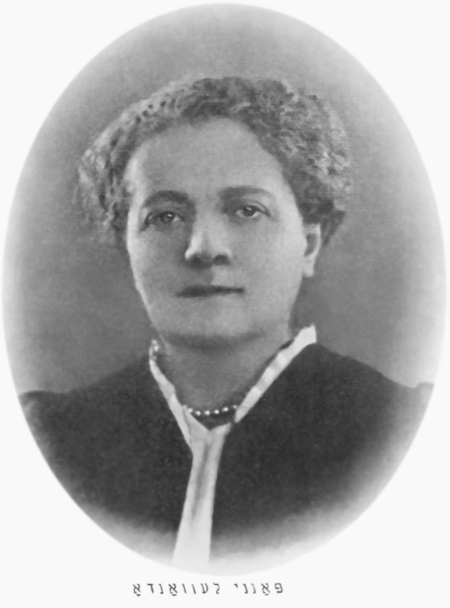 Porträt von Fania Lewando, Autorin des ersten auf Jiddisch verfassten vegetarischen Kochbuchs in Europa mit dem Titel „Vegetarish-dietisher kokhbukh : 400 shpayzn gemakht oysshlislekh fun grins“